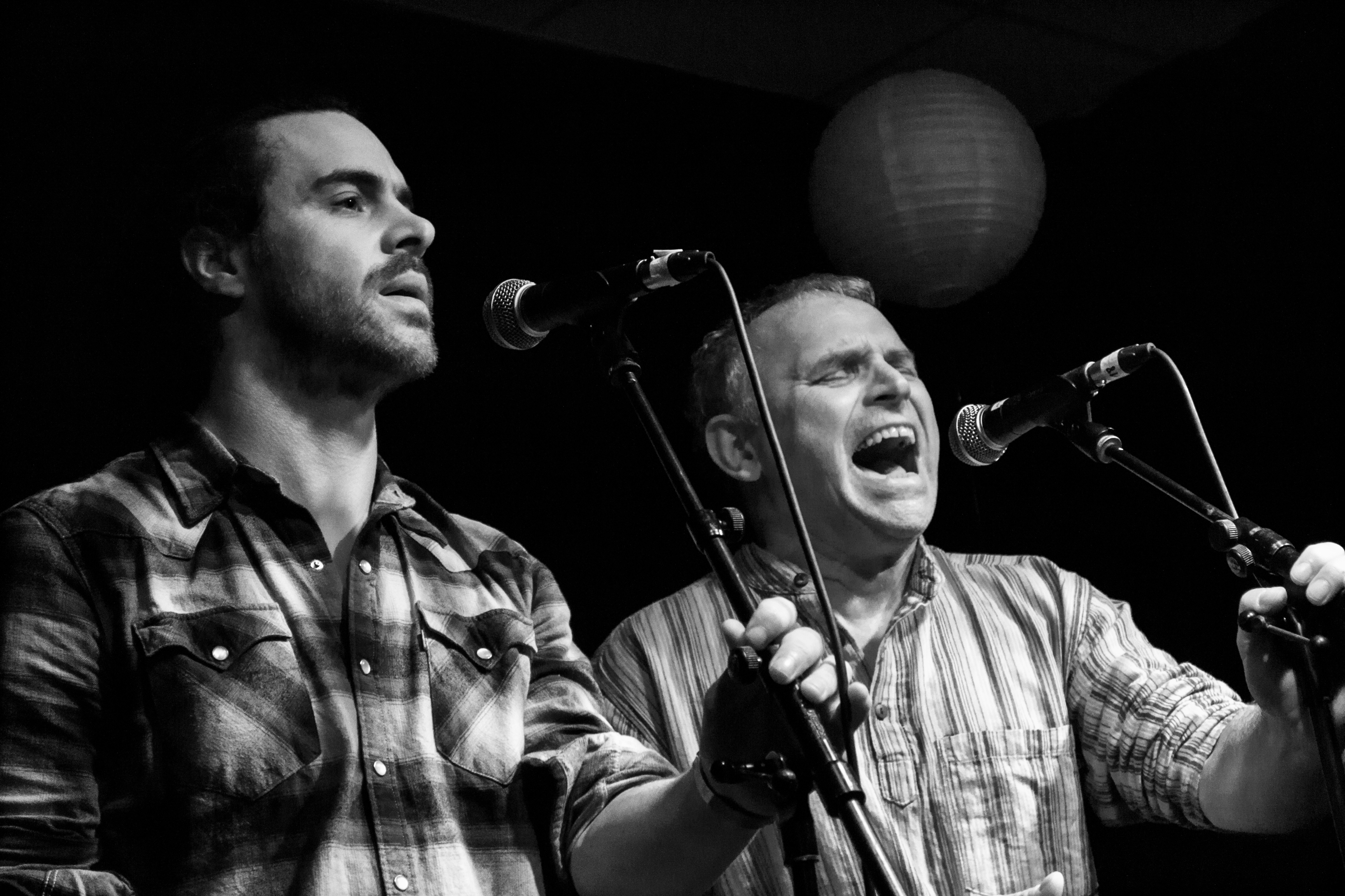 Fest-deiz et fest-noz du 5ème « Entre-deux Fest » organisé le 30 décembre 2016 à Poullaouen par Dañs-tro pour fêter les 26 ans de scène d'Annie Ebrel et Nolùen Le Buhé, célèbre duo de kan ha diskan.